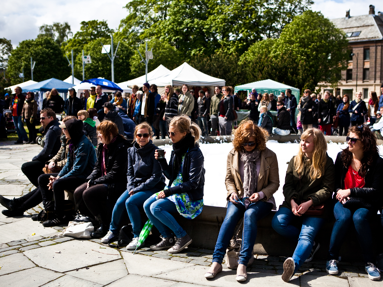 Musikkfest Trondheim 2012